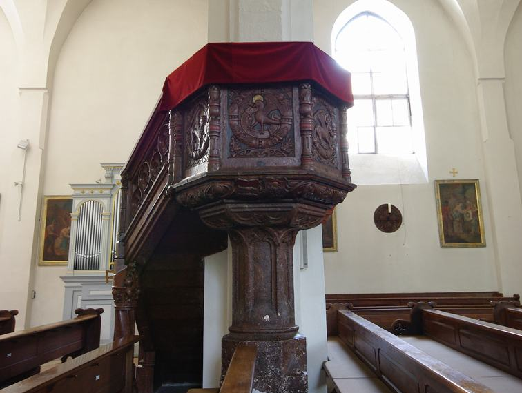 Salzburger Str. 32, 83435 Bad Reichenhall, Münster St. Zeno Genehmigung für Innenaufnahmen durch Erzbischöfliches Ordinariat München, Ressort Bauwesen und Kunst vom 21.08.2012 liegt schriftlich vor.This is a photograph of an architectural monument.